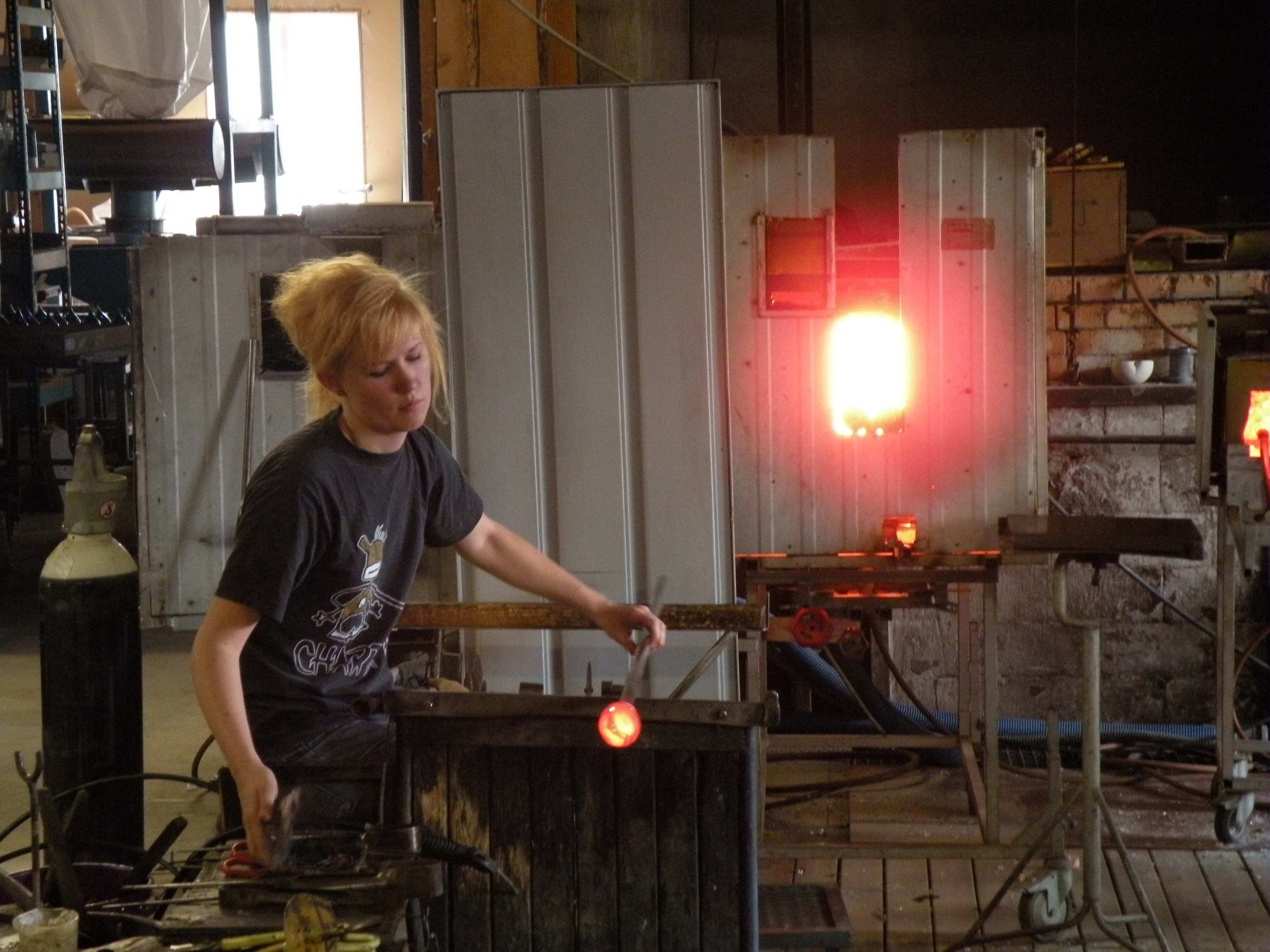 Den dagen vi besökte Bergdala var det bara två som jobbade i hyttan. Tjejer bägge två!